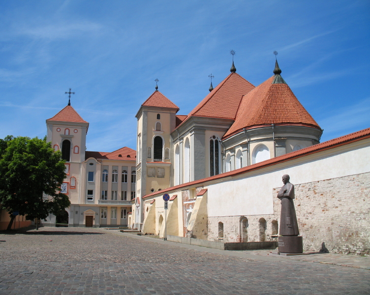 Švč. Trejybės (Seminarijos) bažnyčia, paminklas vyskupui Motiejui Valančiui, Kaunas.